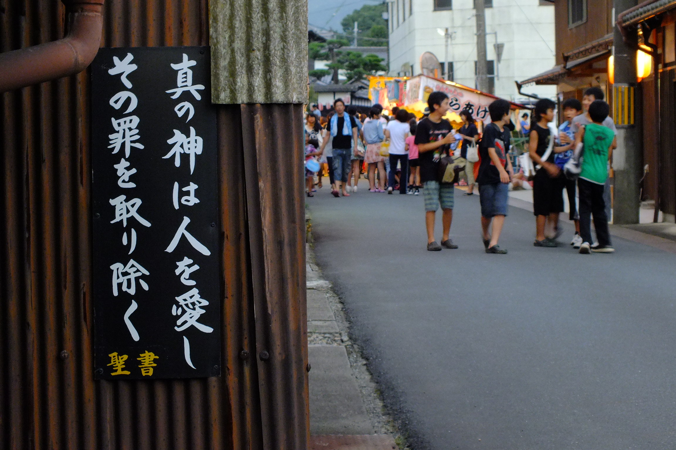 2015-07-31Minazuki-Festival Kokuryo,Tamba,Hyogo-Japan 国領水無月祭り